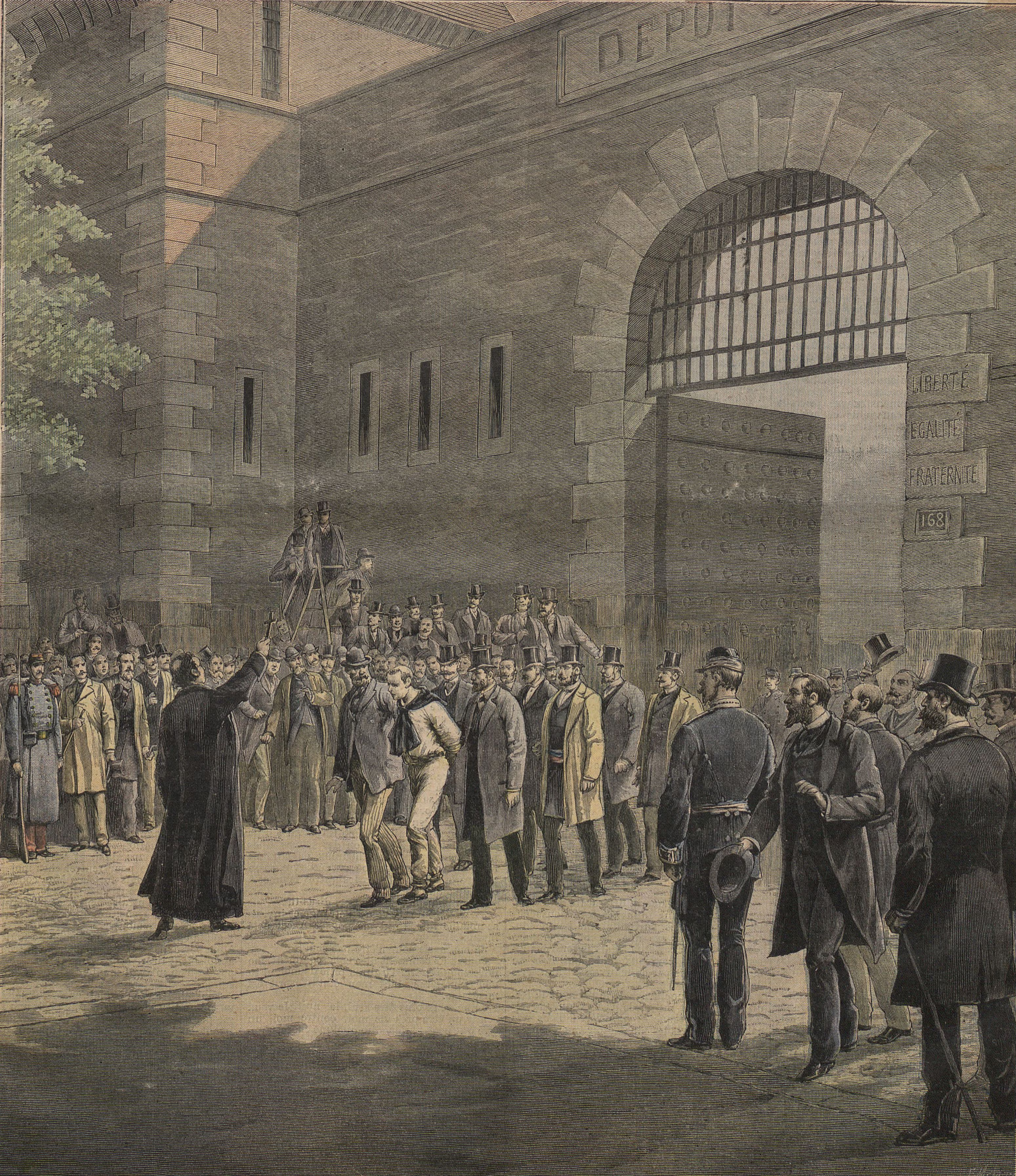 Sortie de la prison de la Roquette de Doré et Berland pour leur exécution. Le Petit Journal du 8 août 1891